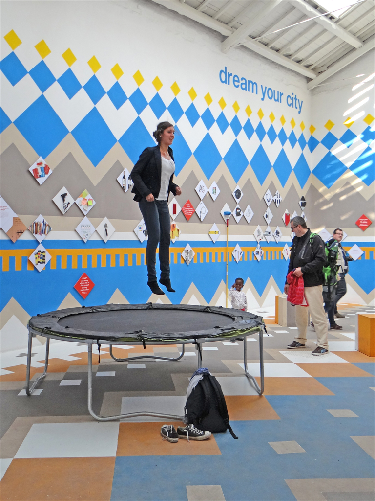 Ecosistema Urbano / projet de Belinda Tato y Jose Luis Vallejo Ecosistema Urbano travaille sur la recherche et le développement d'outils offrant de nouvelles possibilités d'interaction et de participation de différents groupes sociaux, tout en favorisant la créativité et l'utilisation des technologies. Open Innovation Platform on Architecture Site du pavillon de l'Espagne Commissario: Gobierno de España. Ministerio de Fomento. Dirección General de Arquitectura, Vivienda y Suelo with ACE (Acción Cultural Española), AECID (Agencia Española de Cooperación Internacional para el Desarrollo). Curatore: Antón García-Abril, Débora Mesa. Sede: Padiglione ai Giardini